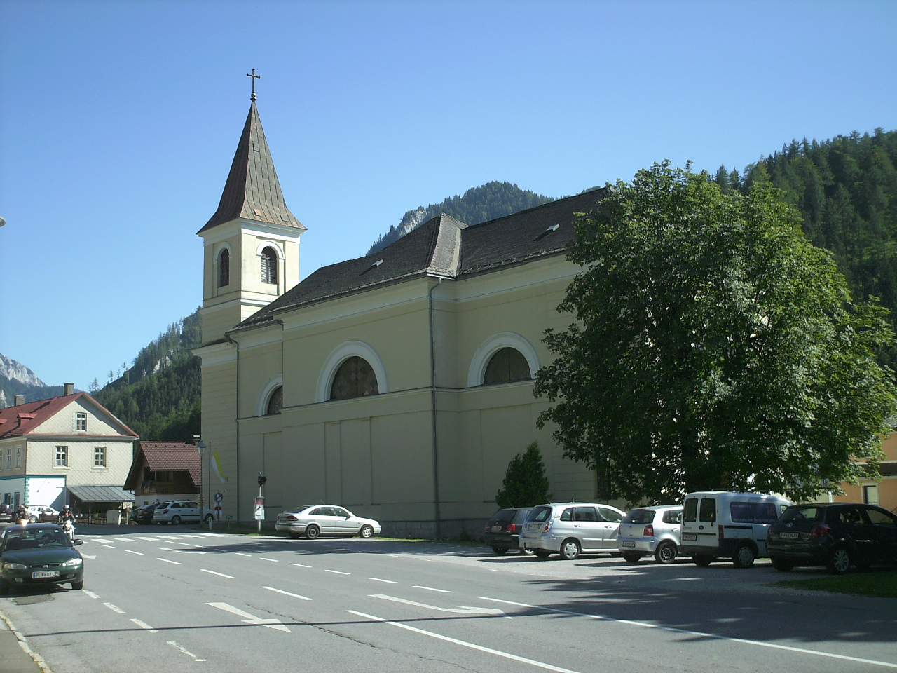 Kath. Pfarrkirche Zum Hl. Kreuz in Gußwerk/Österreich.